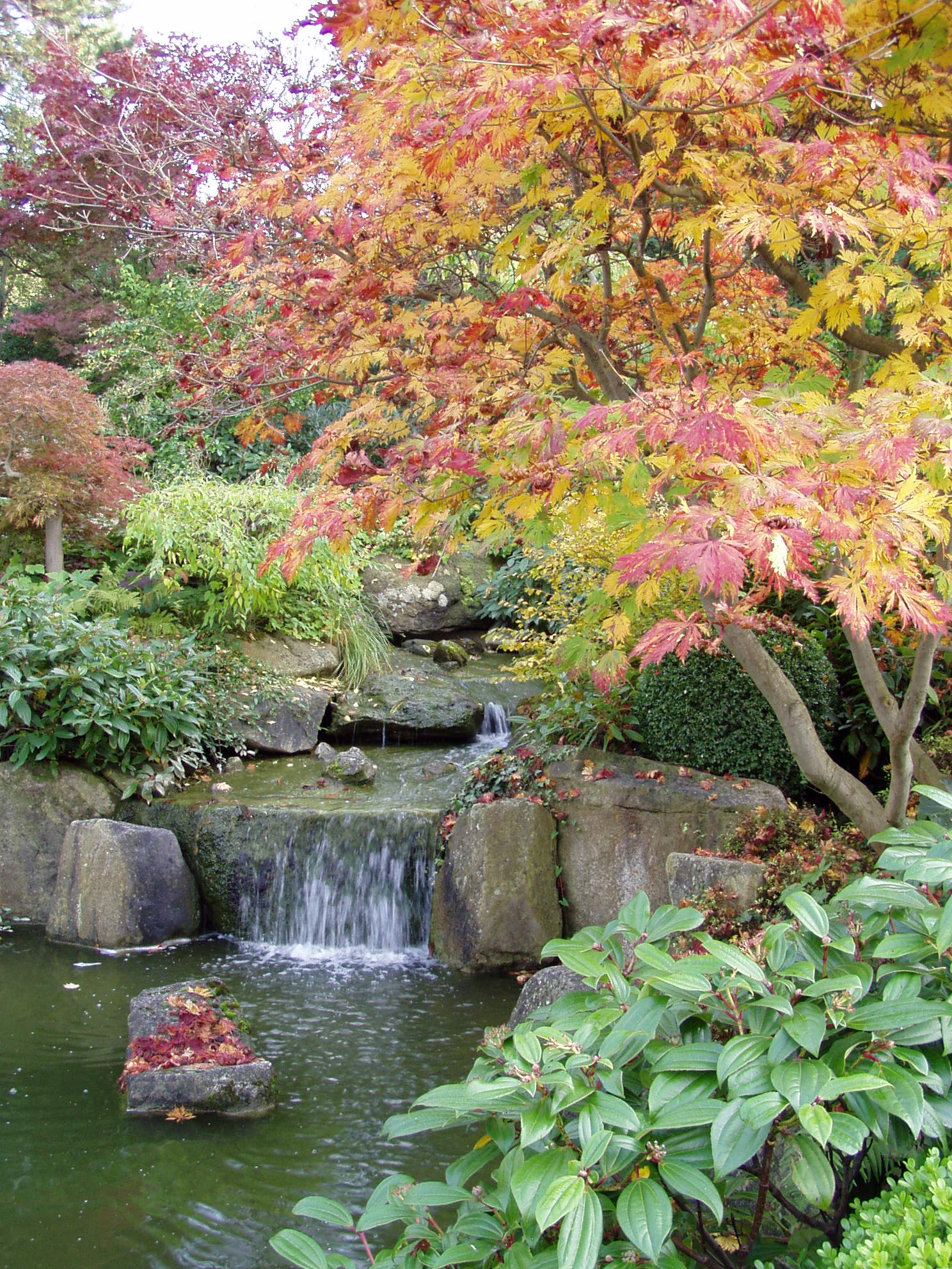 Im Japanischen Garten Würzburg